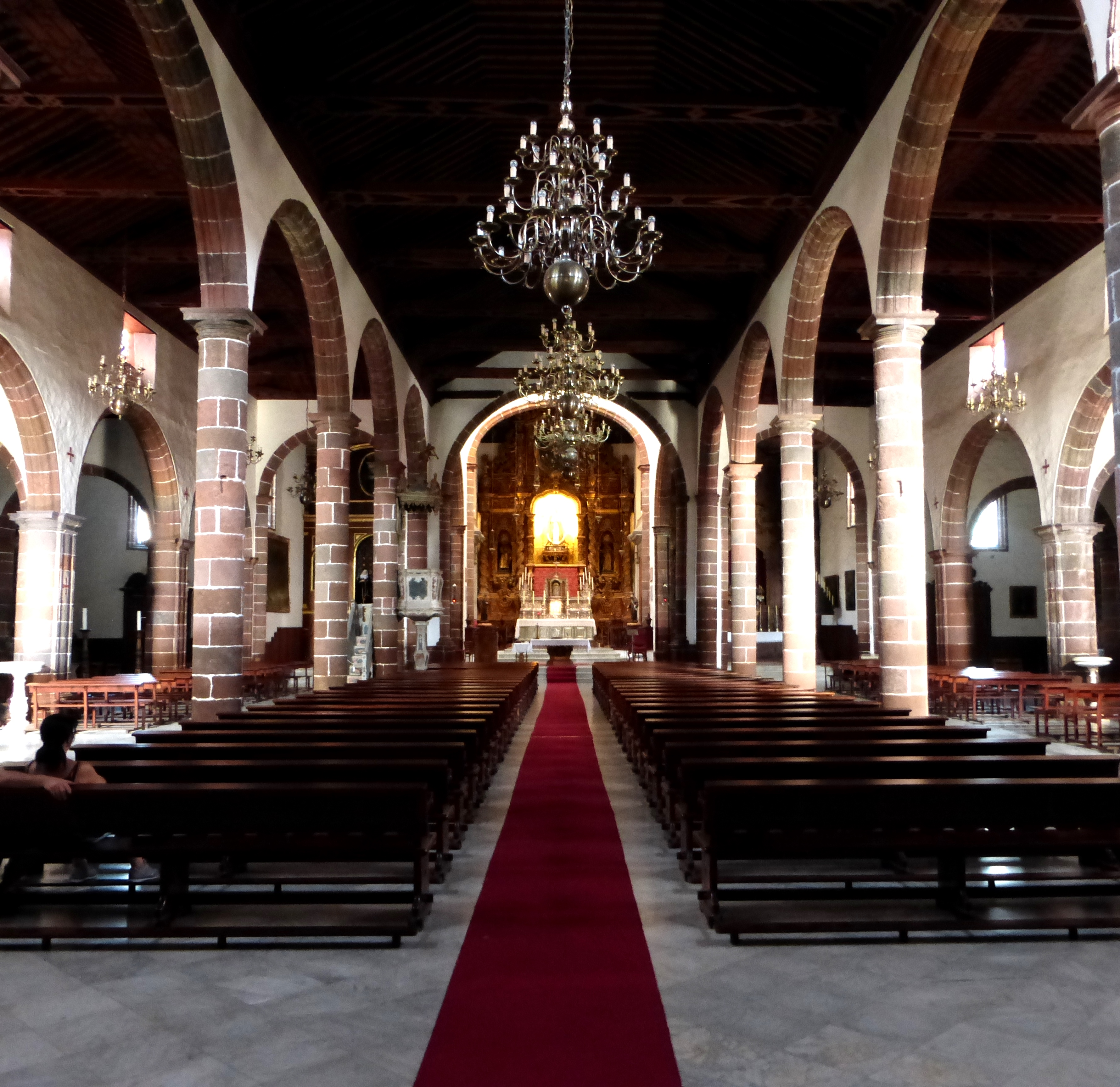 La chiesa di Nuestra Señora de la Concepción a Santa Cruz de Tenerife